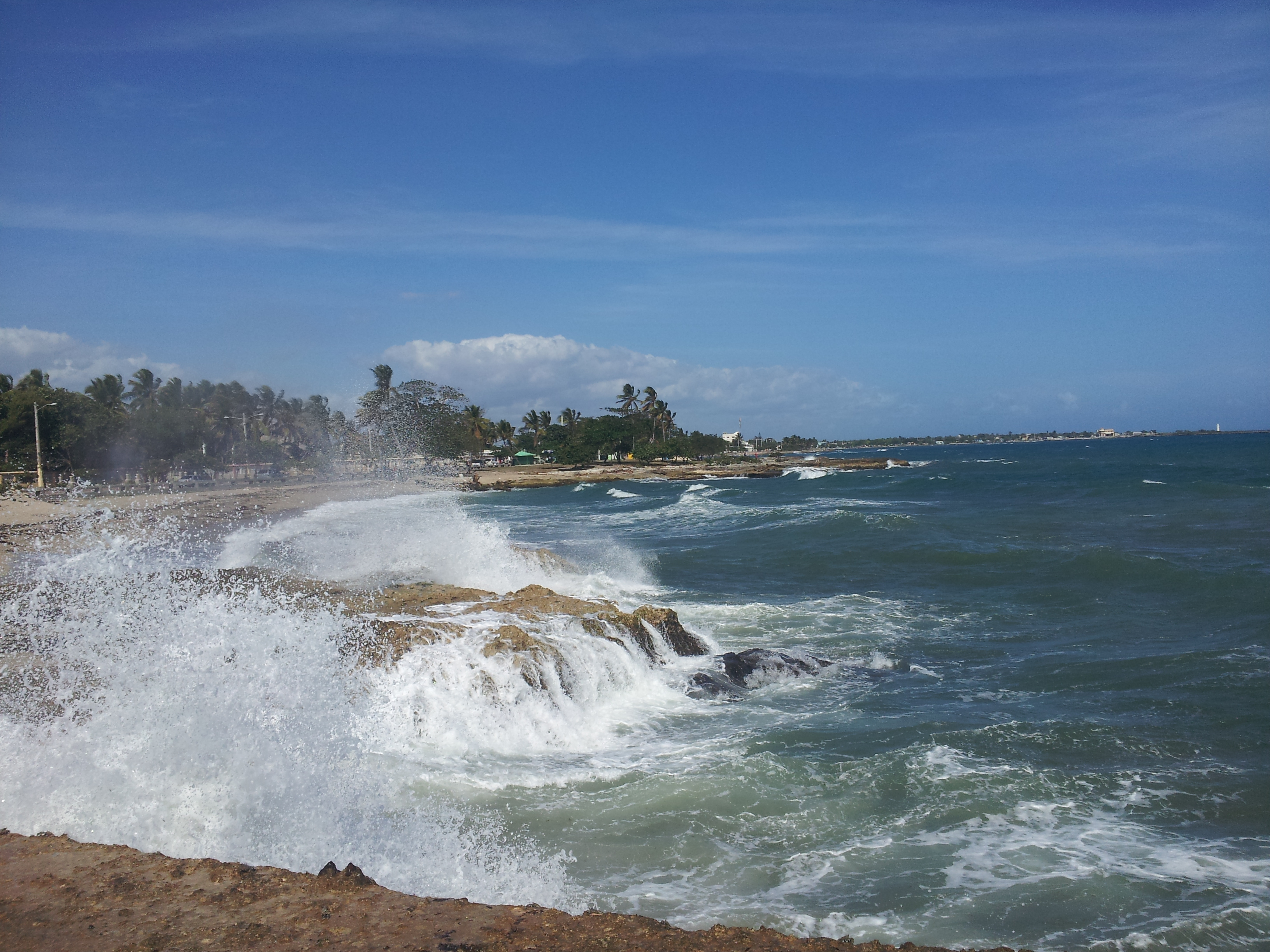 Malecón de San Pedro de Macorís en la Tarde